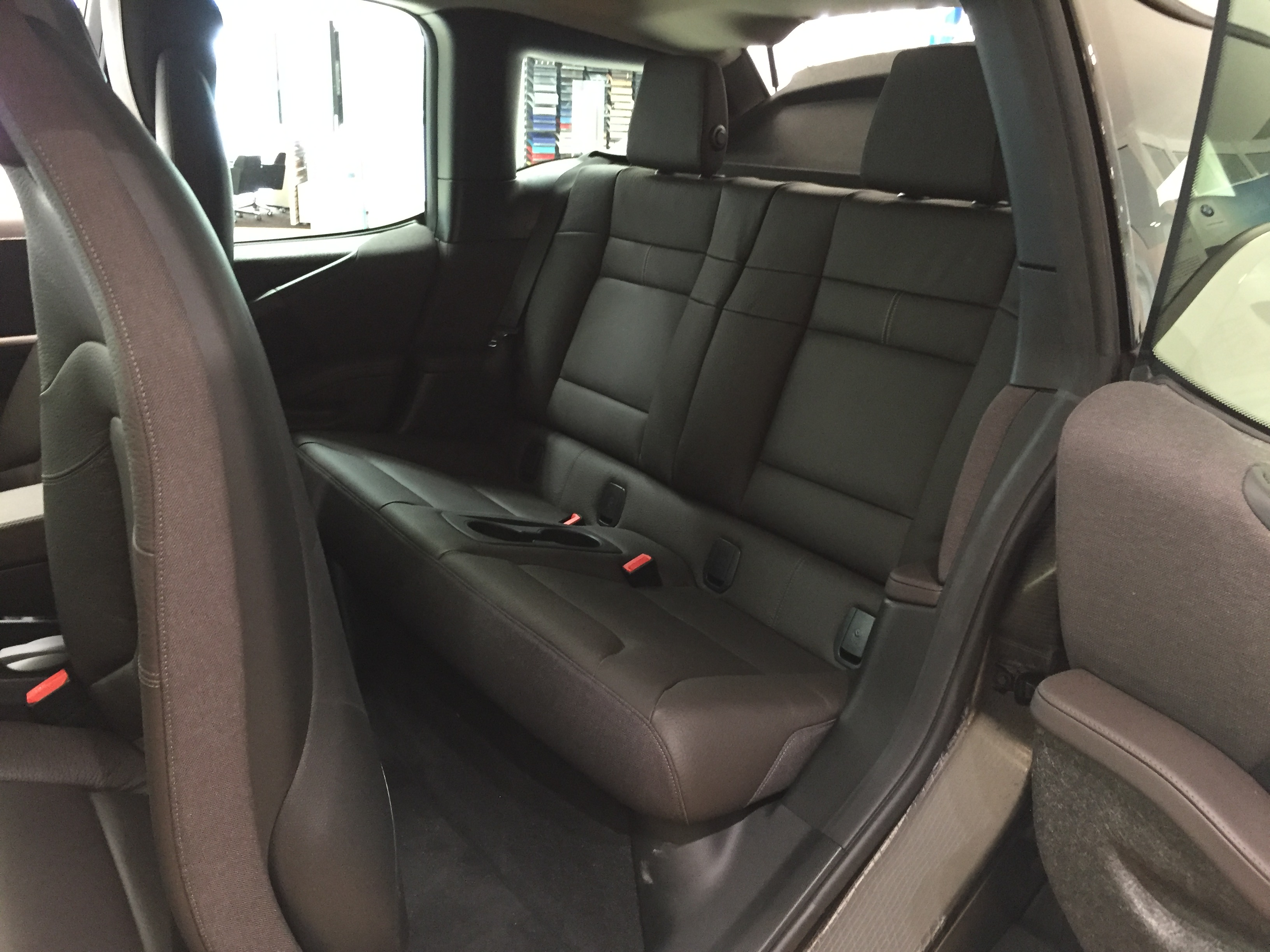 BMW i3 Rücksitzbank